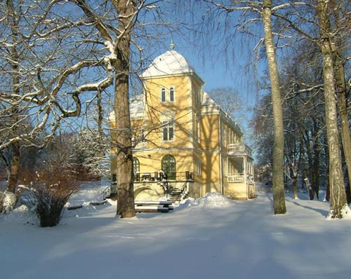 Замък във Форшхага.